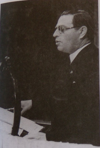 Беларуская (тарашкевіца): Радаслаў Астроўскі (Radasłaŭ Astroŭski)